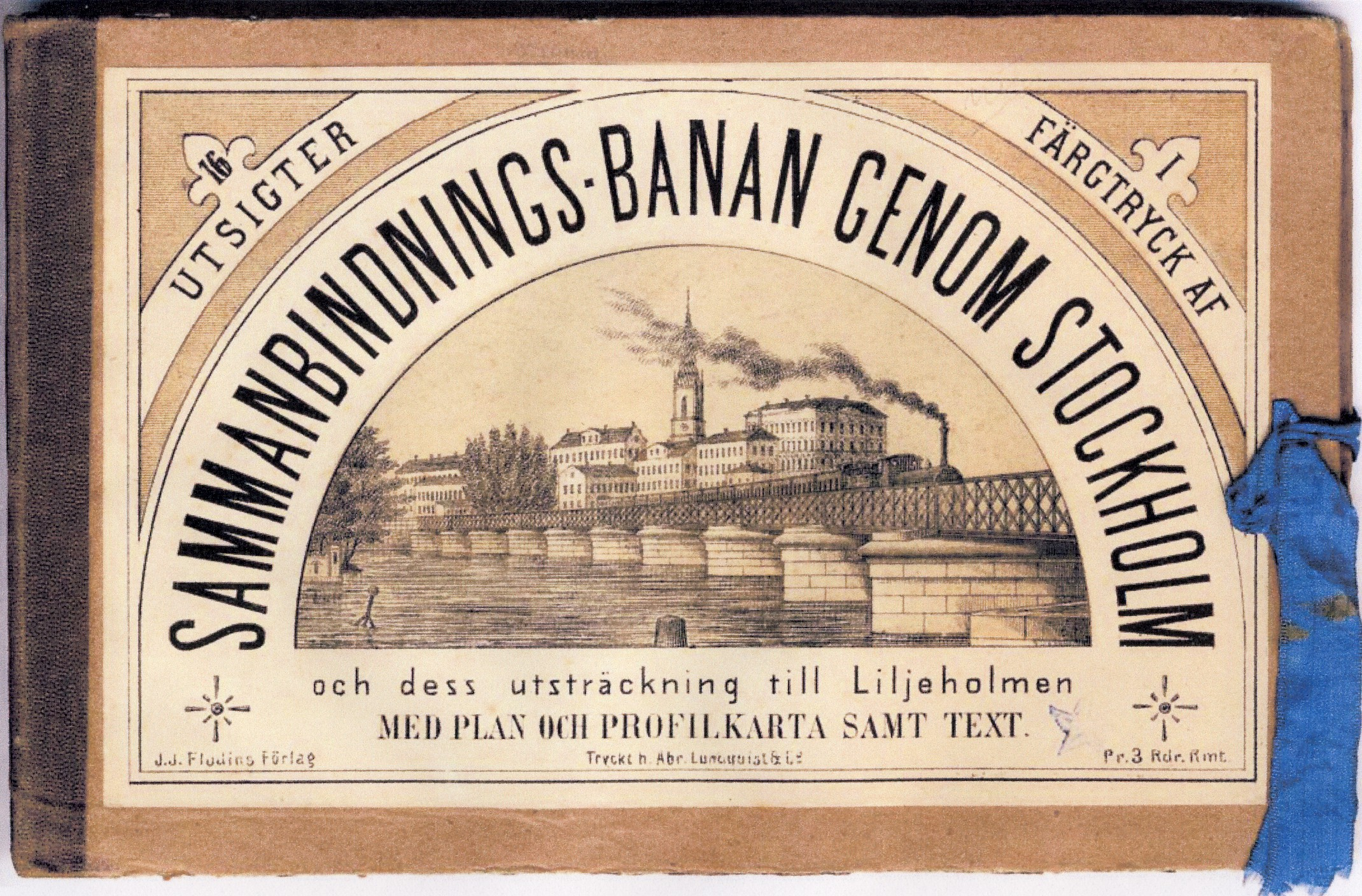 "16 Utsigter i färgtryck af sammanbindnings-banan genom Stockholm och dess utsträckning till Liljeholmen: med plan och profilkarta samt text. "